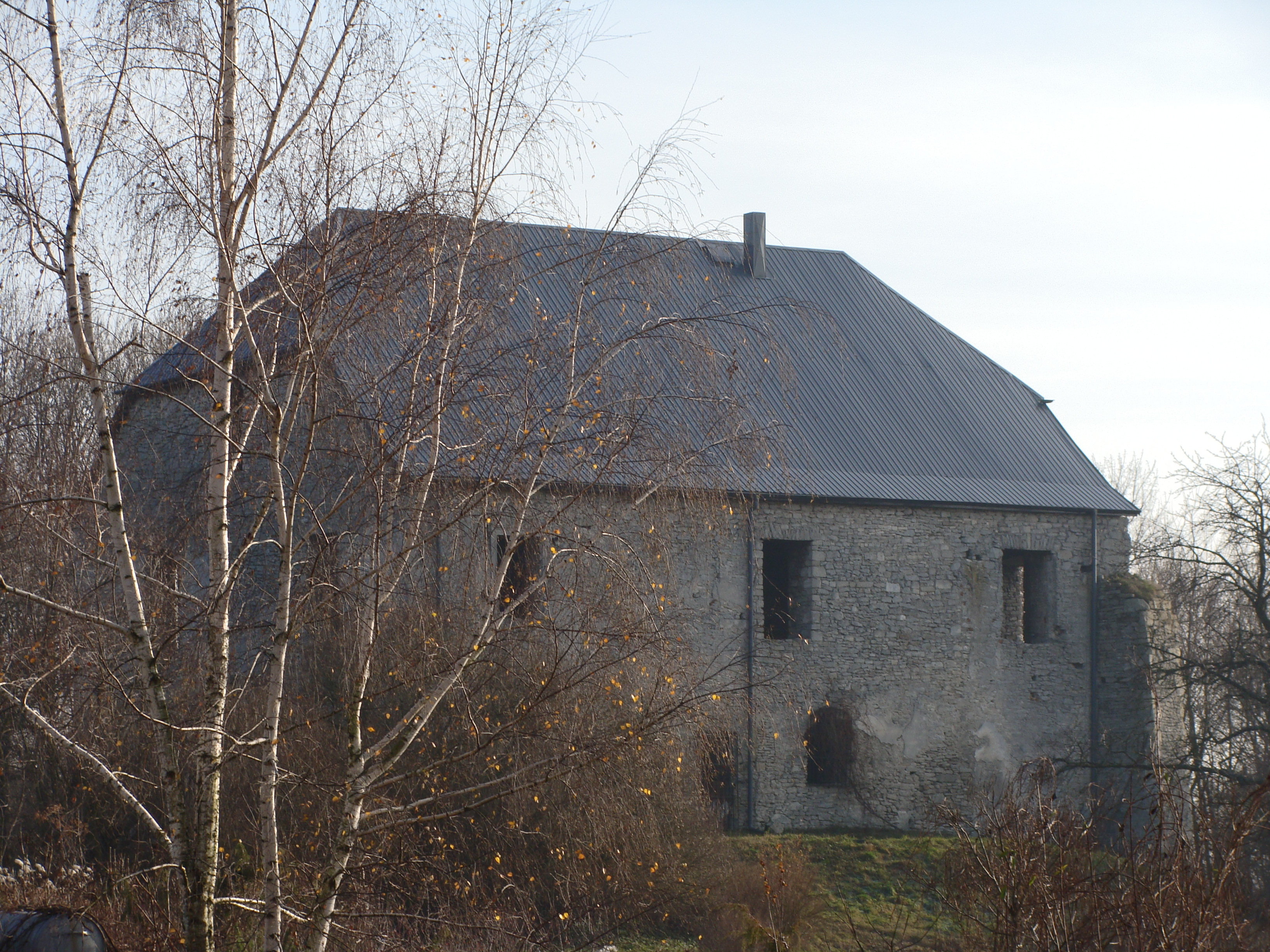 Szaniec zbór ariański